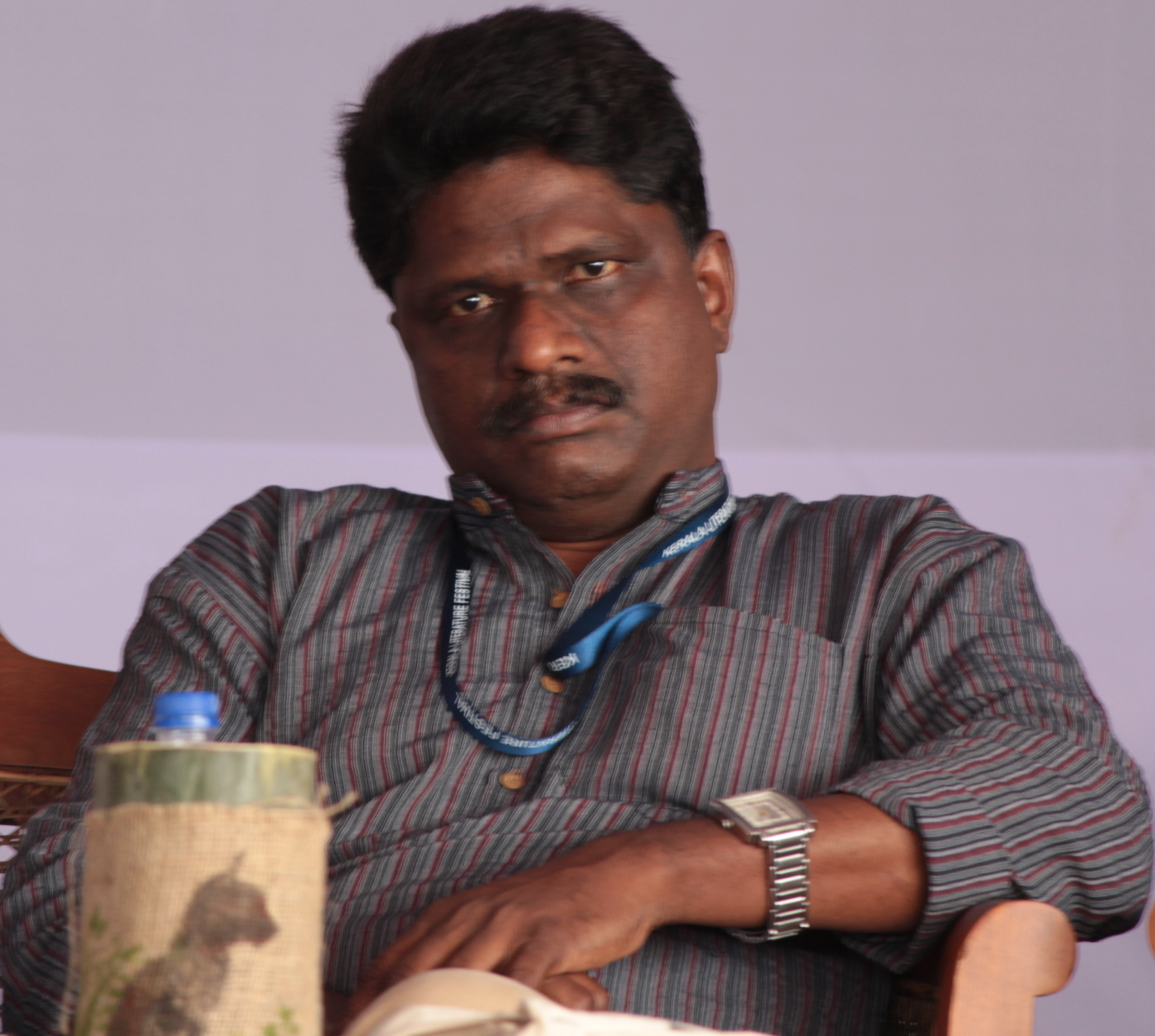 ഉത്തരാധുനിക മലയാള കവിയാണ് എസ് ജോസഫ്